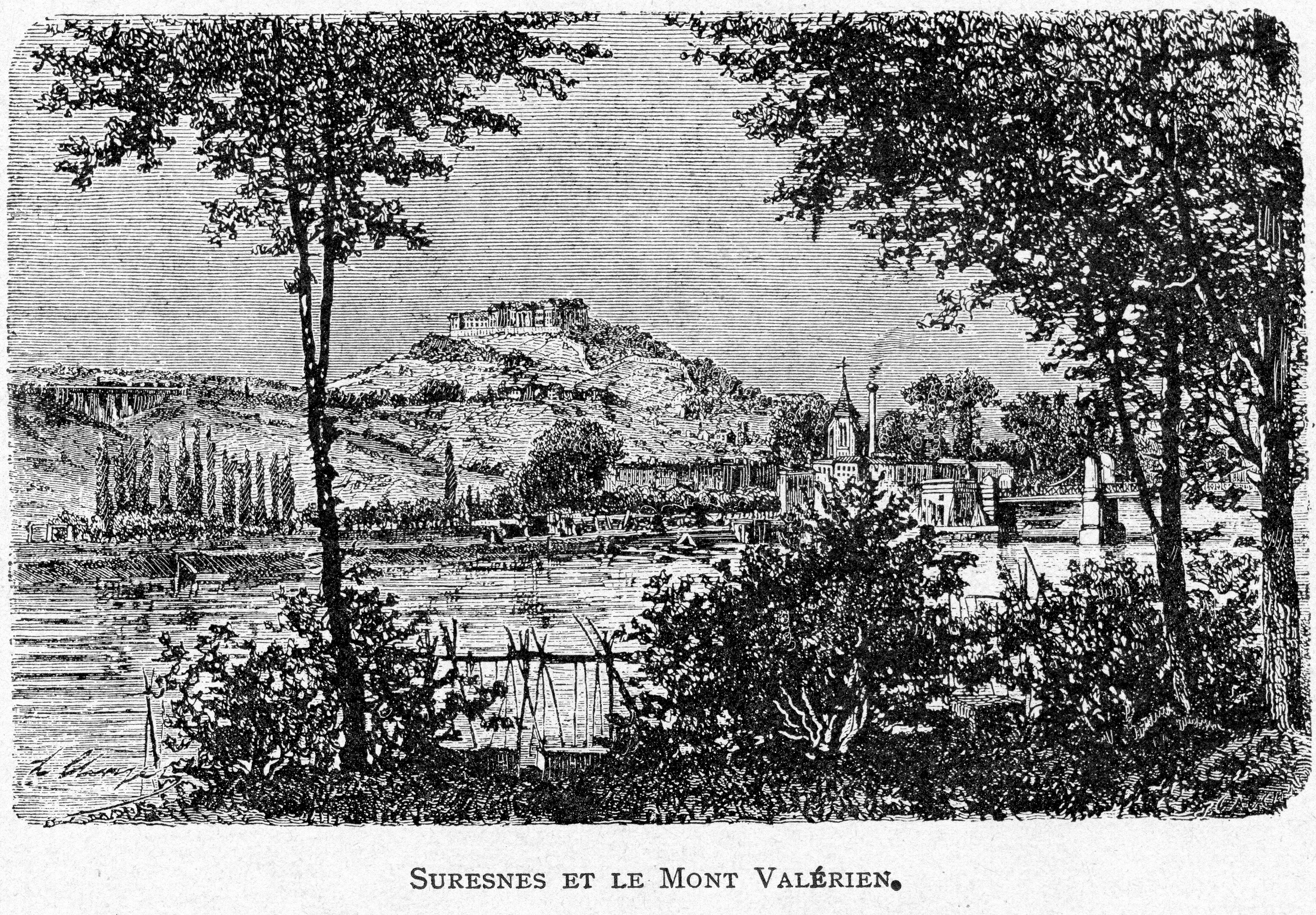 Corbel041 Suresnes et le Mont Valérien